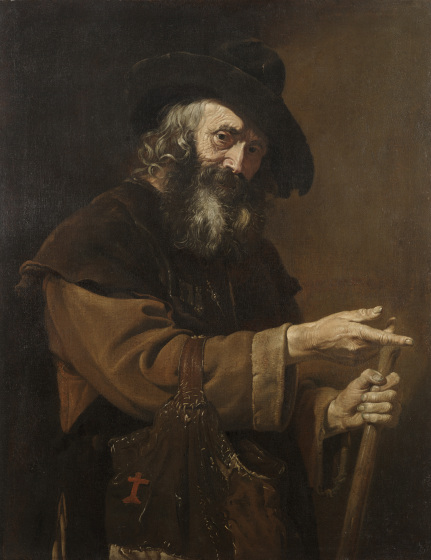 Old Pilgrimlabel QS:Len,"Old Pilgrim" label QS:Lfr,"Vieux Pelerin"